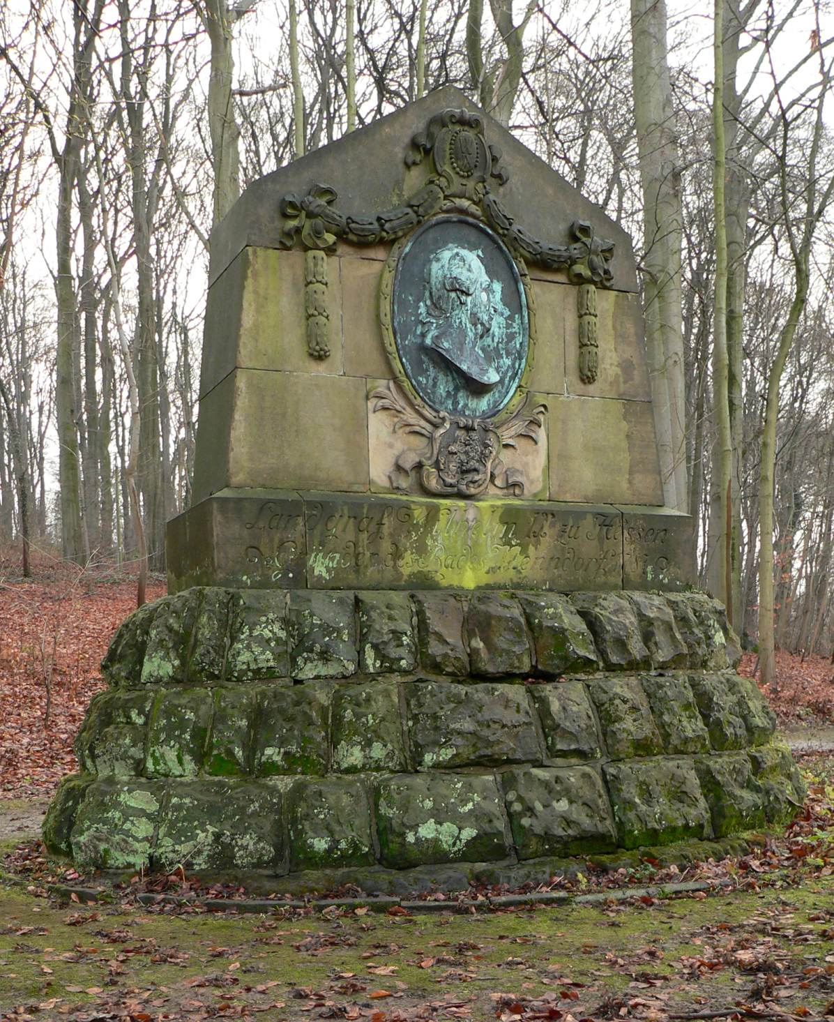 Landgrafendenkmal in Bad Nenndorf für Landgraf Wilhelm IX, Aufschrift auf der Vorderseite: Landgraf Wilhelm IX zu Hessen. Gründer des Bades Nenndorf 1787, Rückseite: In Dankbarkeit von Kurgästen des Bades und Bewohner der Grafschaft Schaumburg errichtet im Jahre 1911